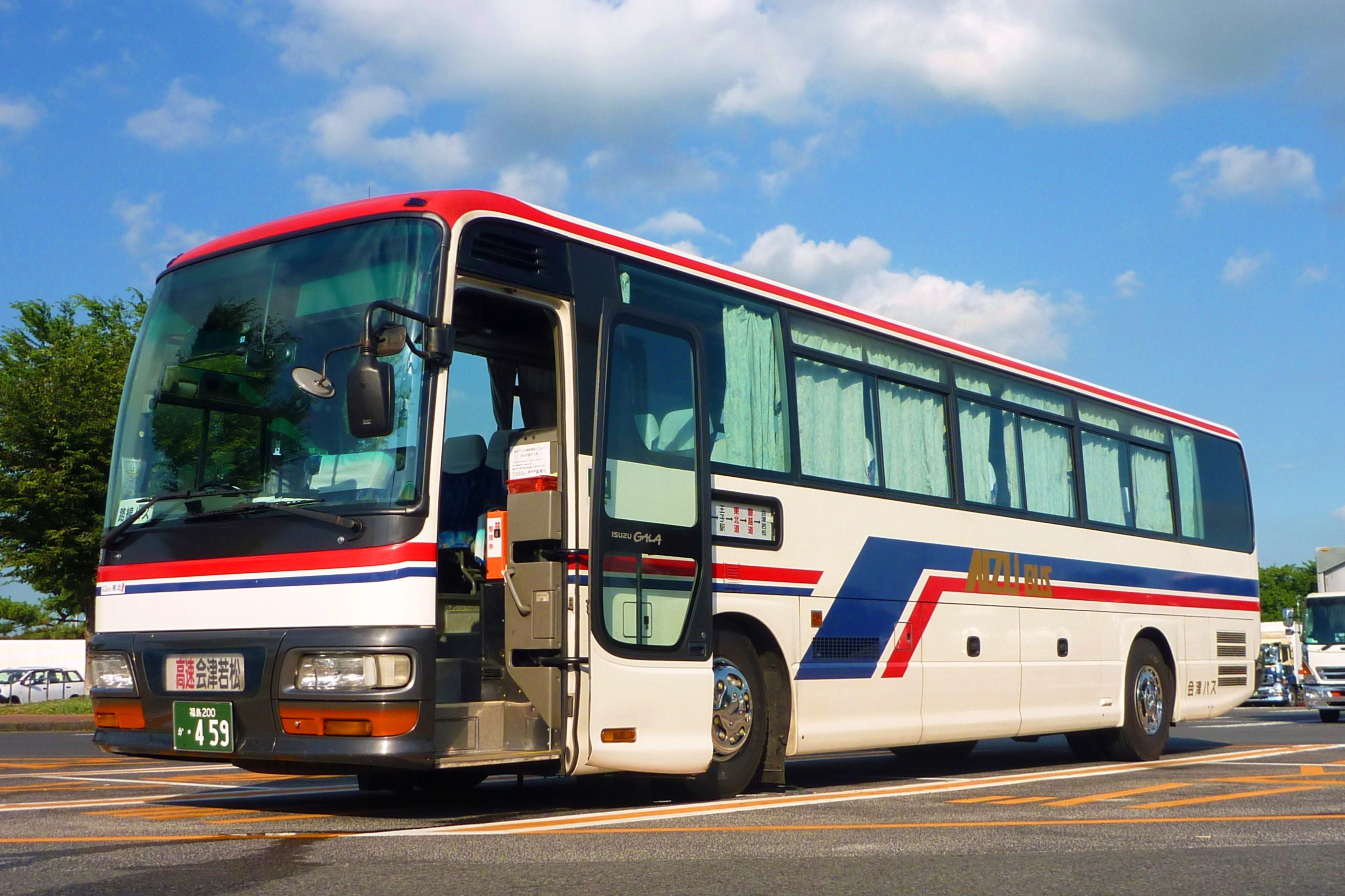 高速バス「夢街道会津号」,会津バス（会津乗合自動車）,いすゞガーラ,福島200か・459